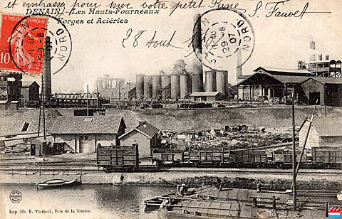 Denain - Hauts-Fourneaux et Forges et Aciéries de Denain-Anzin - avec fours à vent chaud Whitwell (tours cylindriques)